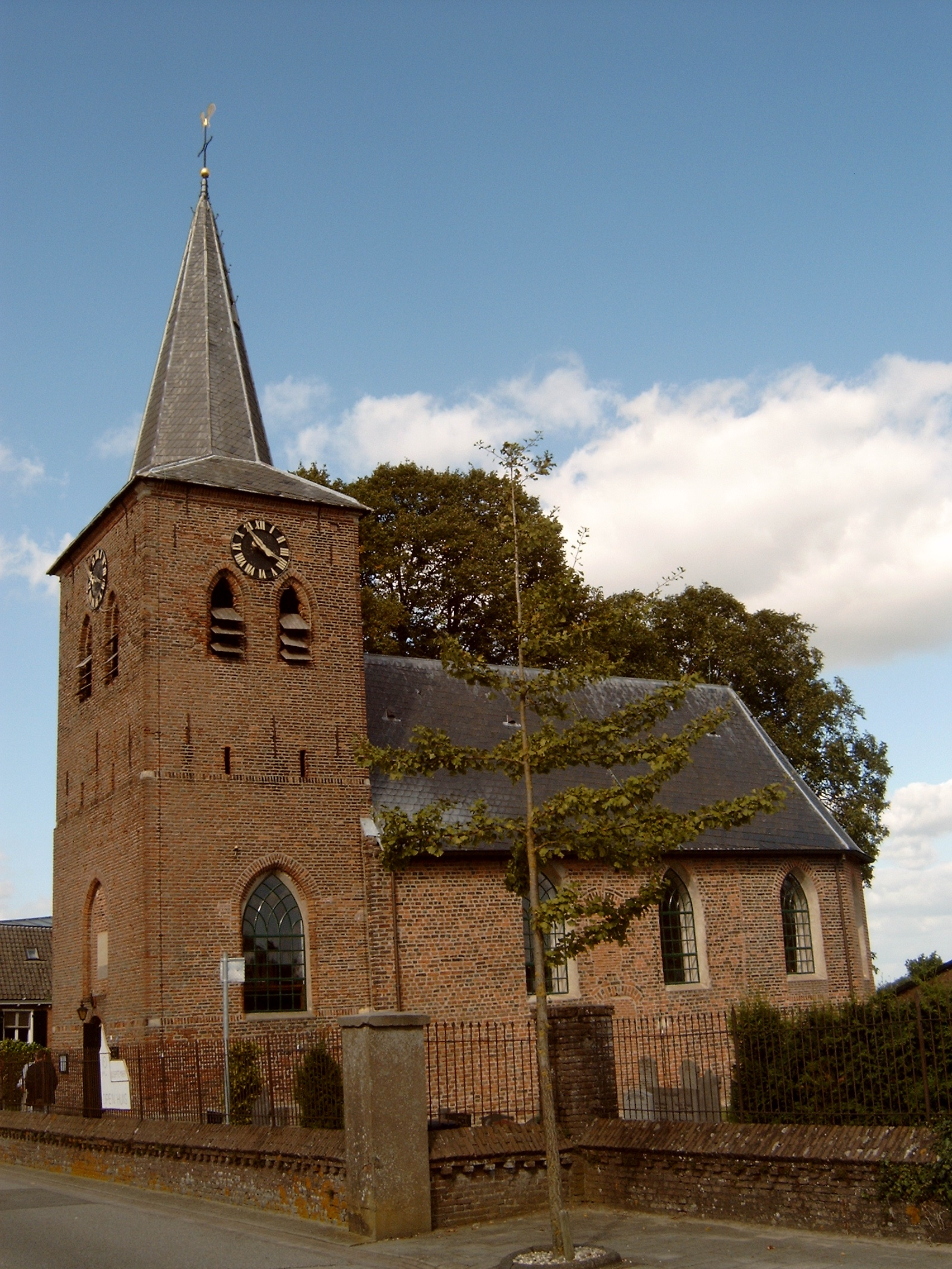 Lathum, kerk